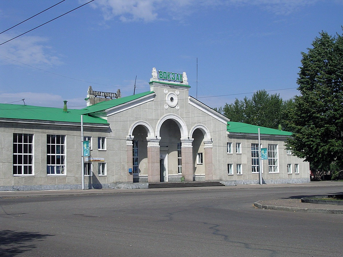 Sterlitamakské nádraží